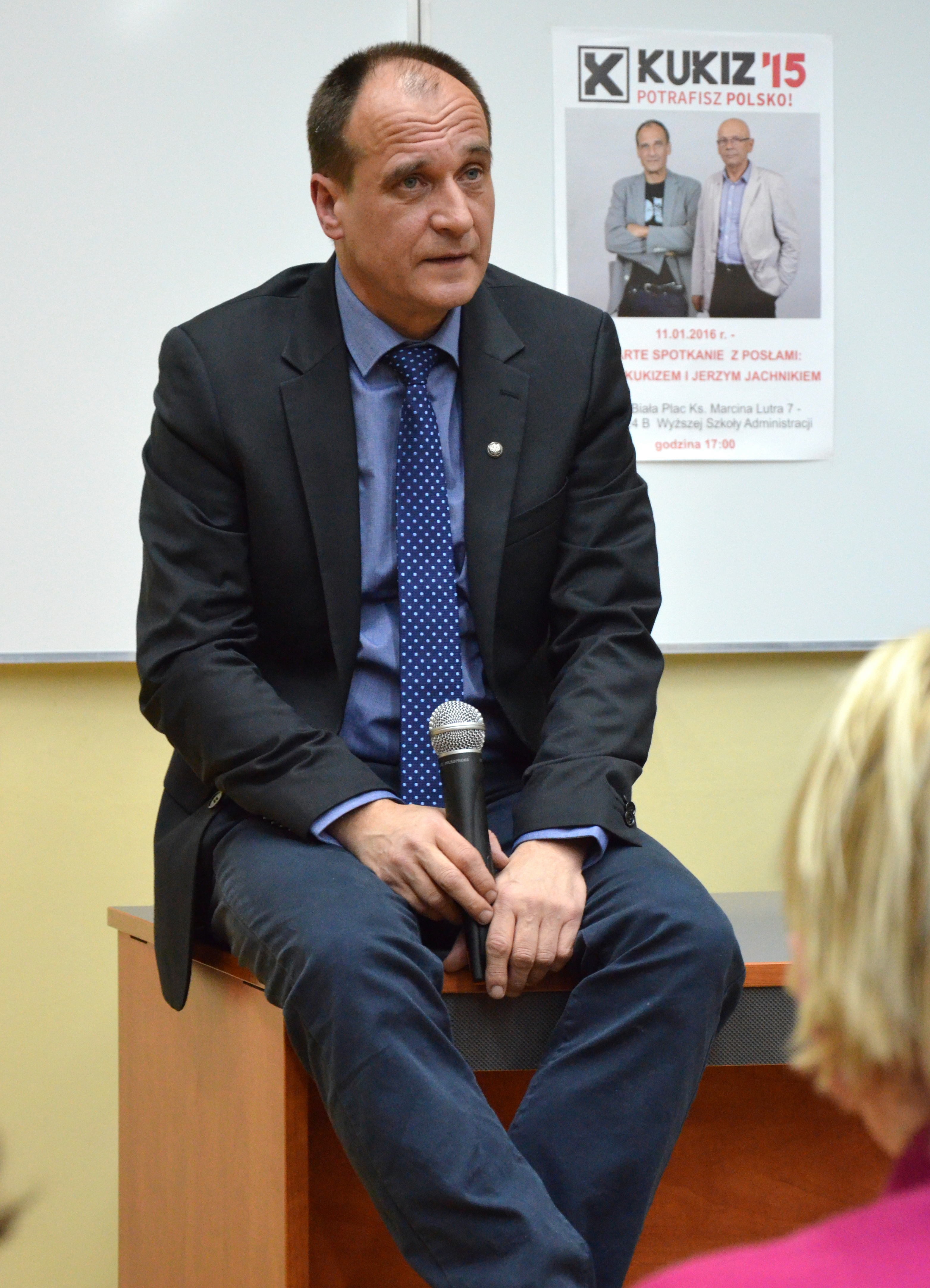 Pawel Kukiz während der Debatte in Bielsko-Biala